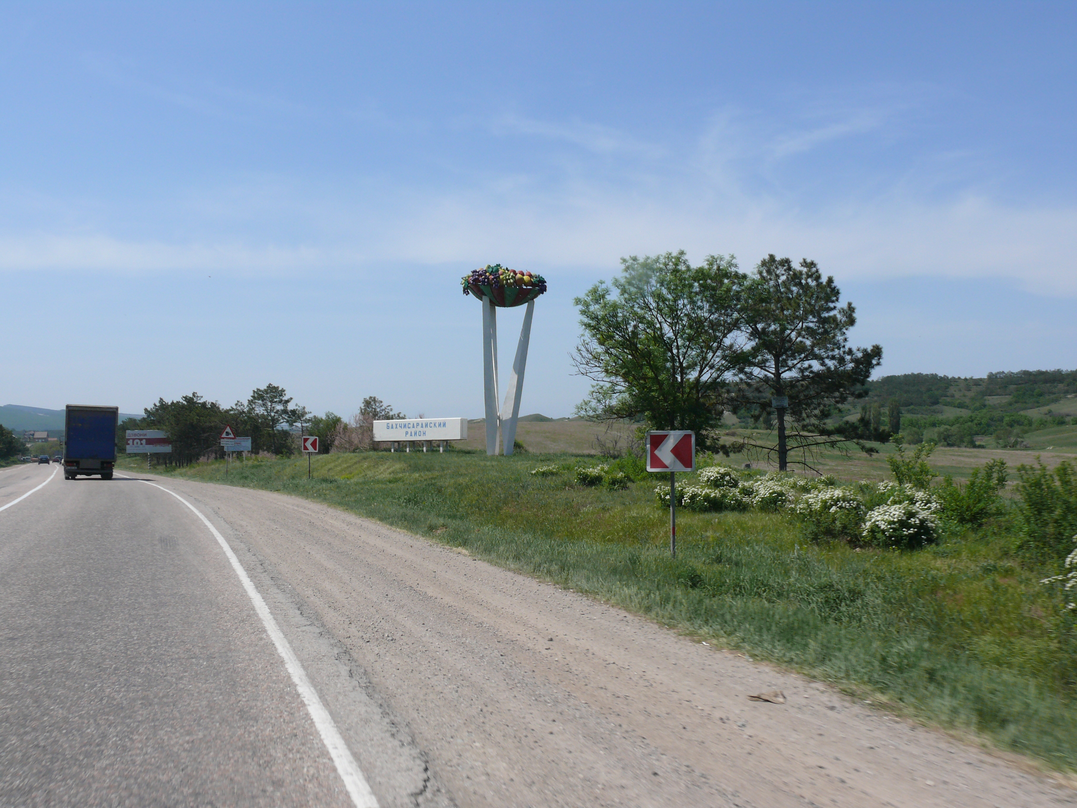 Стела на въезде в Бахчисарайский район Республики Крым. Украина